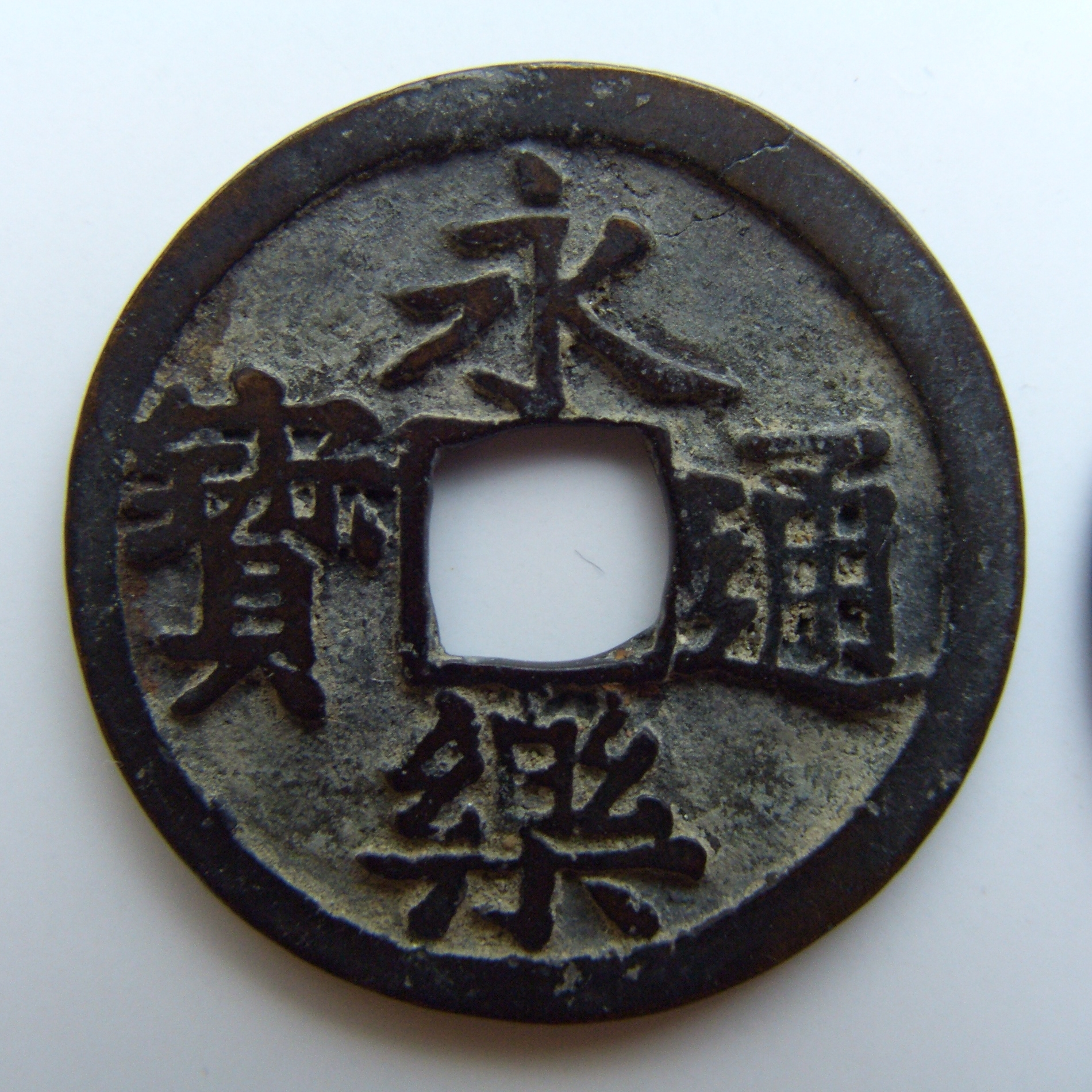 永楽通宝の写真 投稿者撮影（2006年5月13日撮影） 著作権は放棄しませんが（というかできない）、下記ライセンスとは別にあらゆる形で使用を許可します（PD並で提供）。